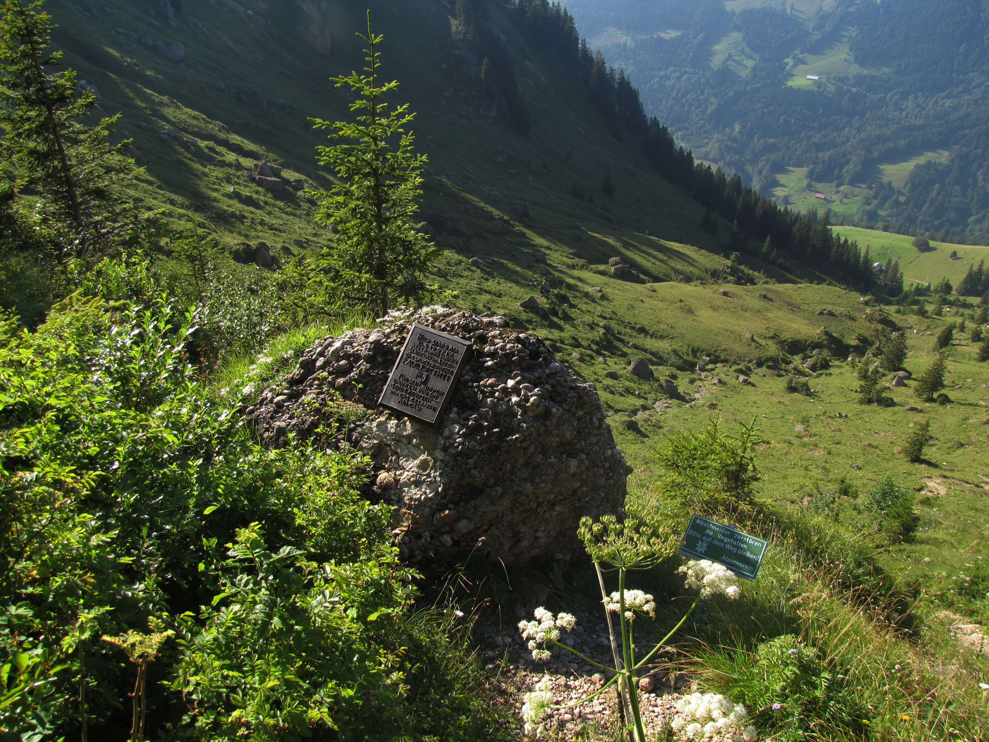 Gedenkplatte für Paul Diethei (1925-1997) am Wanderweg zwischen Brunnenauscharte und dem Almgelände der Brunnenau am Hochgrat.